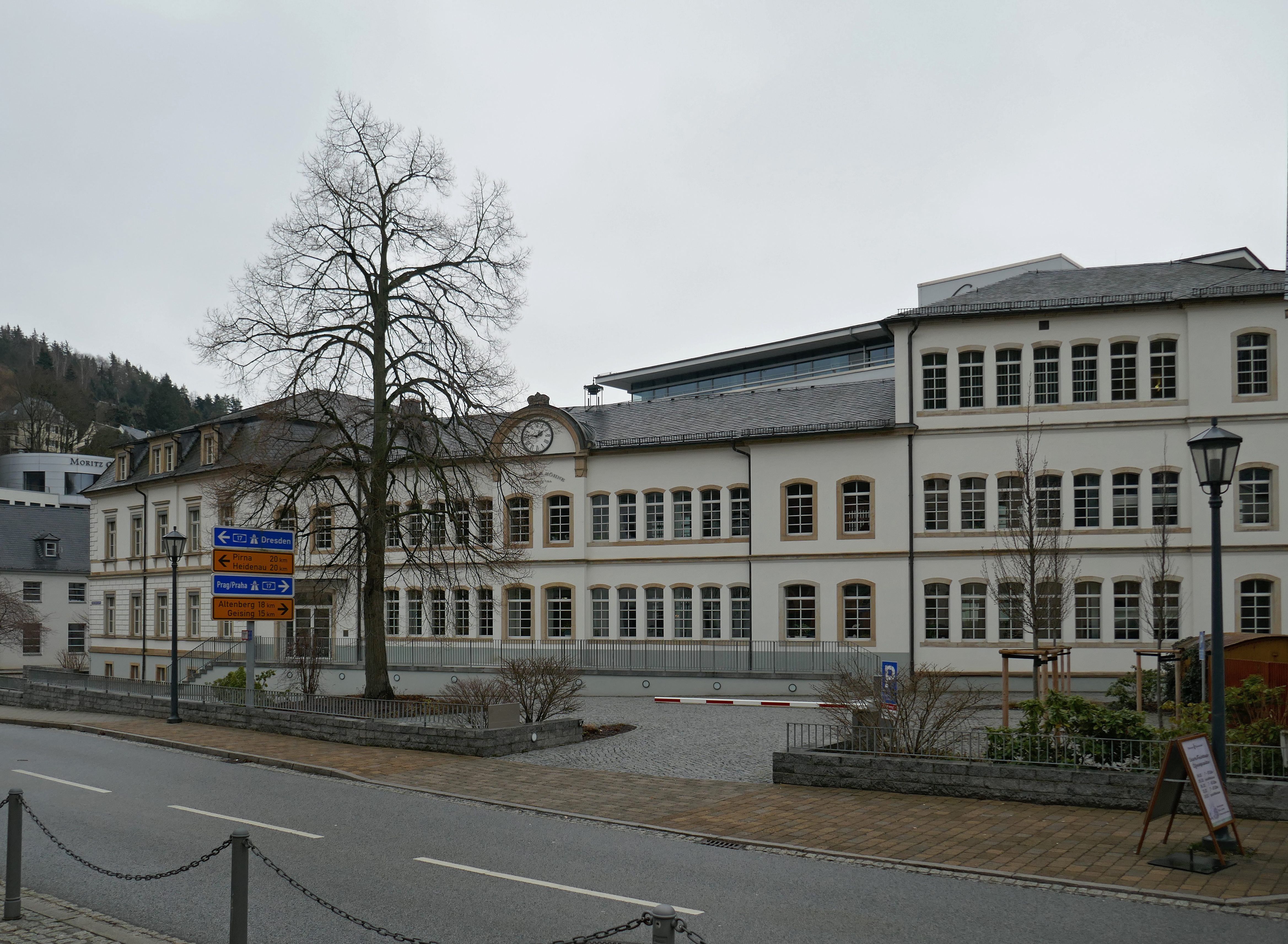 A. Lange & Söhne-Stammhaus in Glashütte im Osterzgebirge, Sachsen.